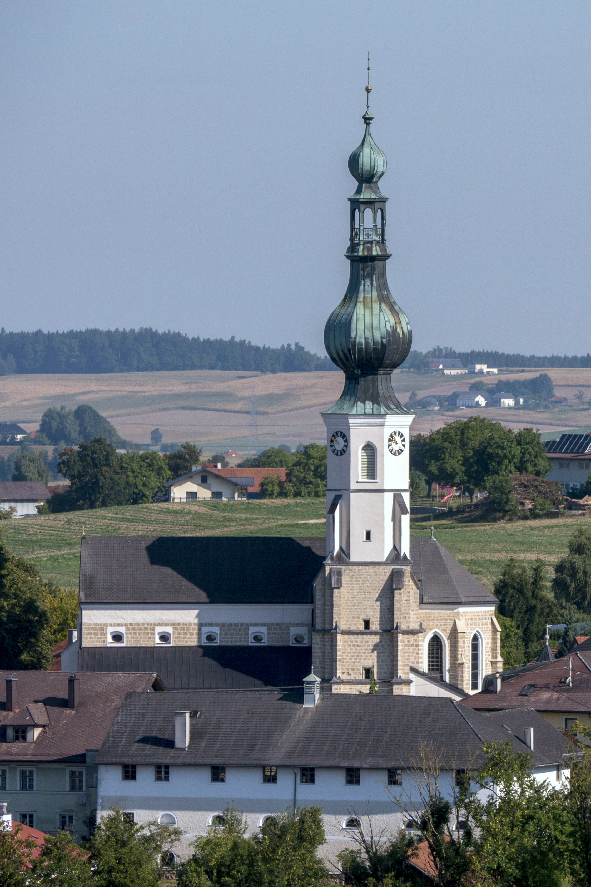 Kath. Pfarrkirche Mariä Himmelfahrt und ehem. Kirchhof